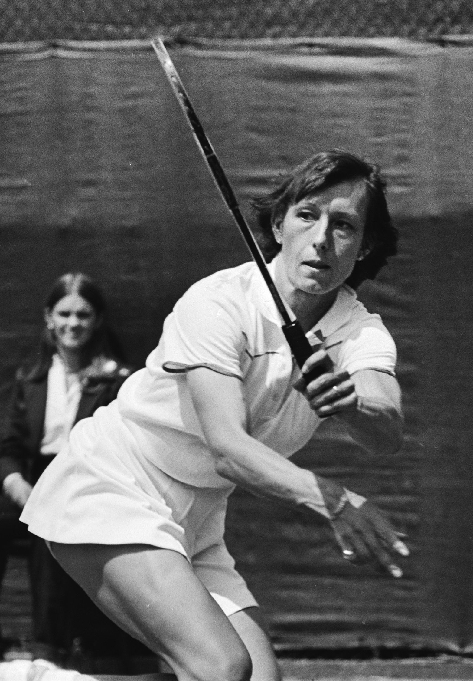 Collectie / Archief : Fotocollectie Anefo Reportage / Serie : [ onbekend ] Beschrijving : Tennis: Nederland tegen Verenigde Staten in Den Haag ; Navratilova in aktie Datum : 6 juli 1980 Locatie : Den Haag, Zuid-Holland Trefwoorden : tennis Fotograaf : Dijk, Hans van / Anefo Auteursrechthebbende : Nationaal Archief Materiaalsoort : Negatief (zwart/wit) Nummer archiefinventaris : bekijk toegang 2.24.01.05 Bestanddeelnummer : 930-9118